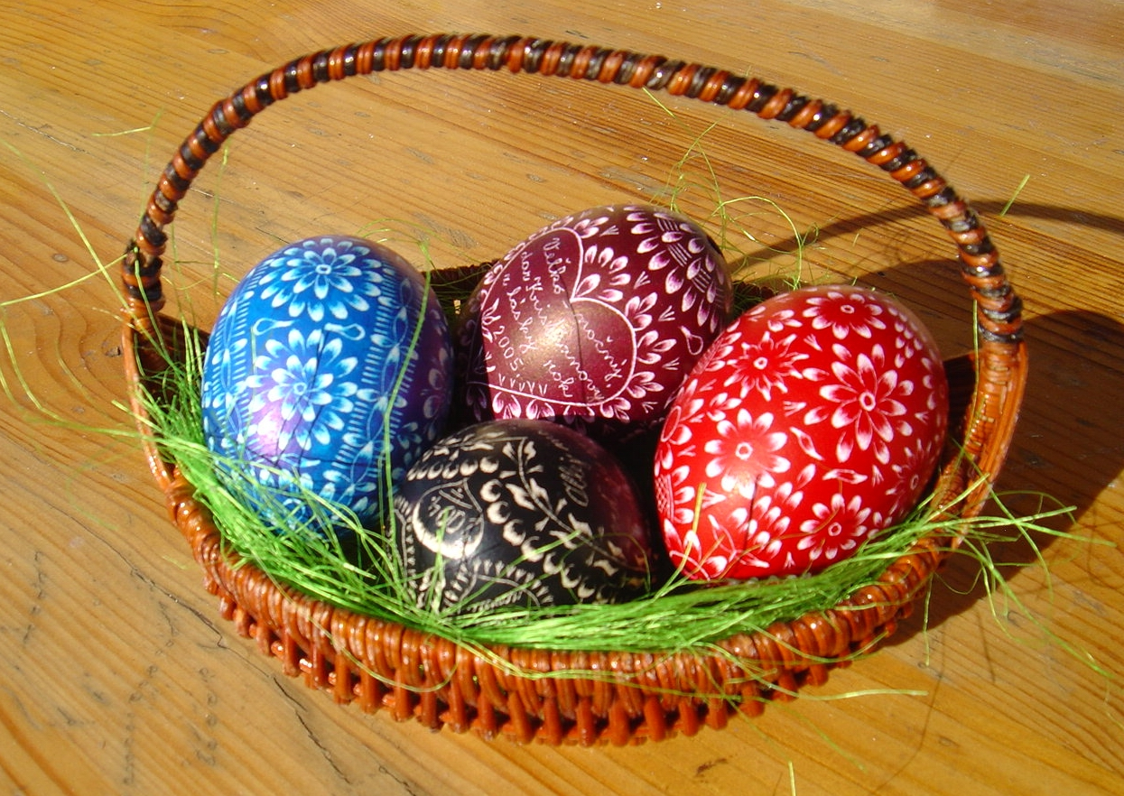 Foto urobil 01.04.2005 Kristián Slimák. Kategória:Obrázky predmetov Kategória:Presunúť_na_Commons